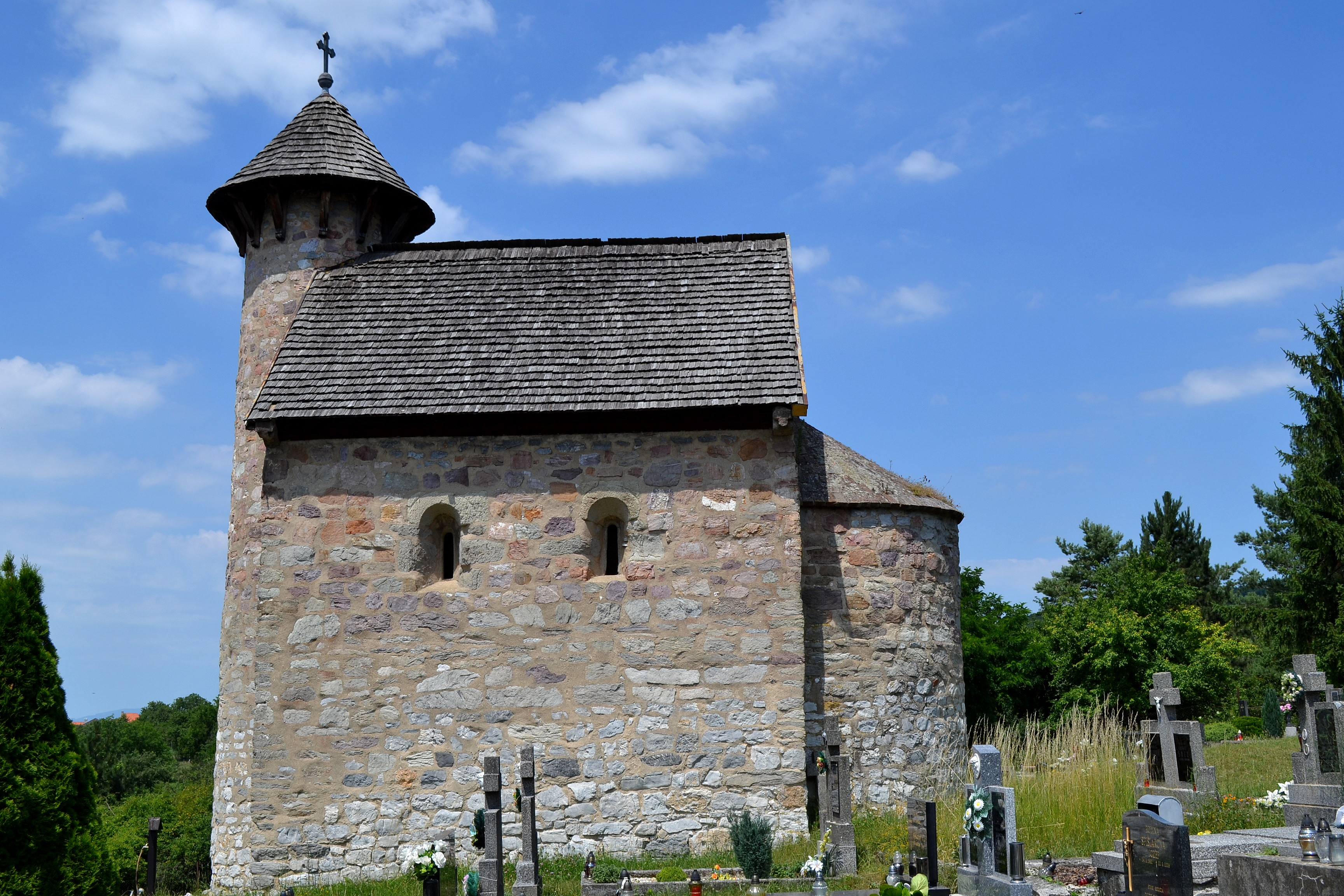 Veľký Klíž, Kostol svätého Michala archanjela v miestnej časti Klížske Hradište; celkový pohľad od juhozápadu